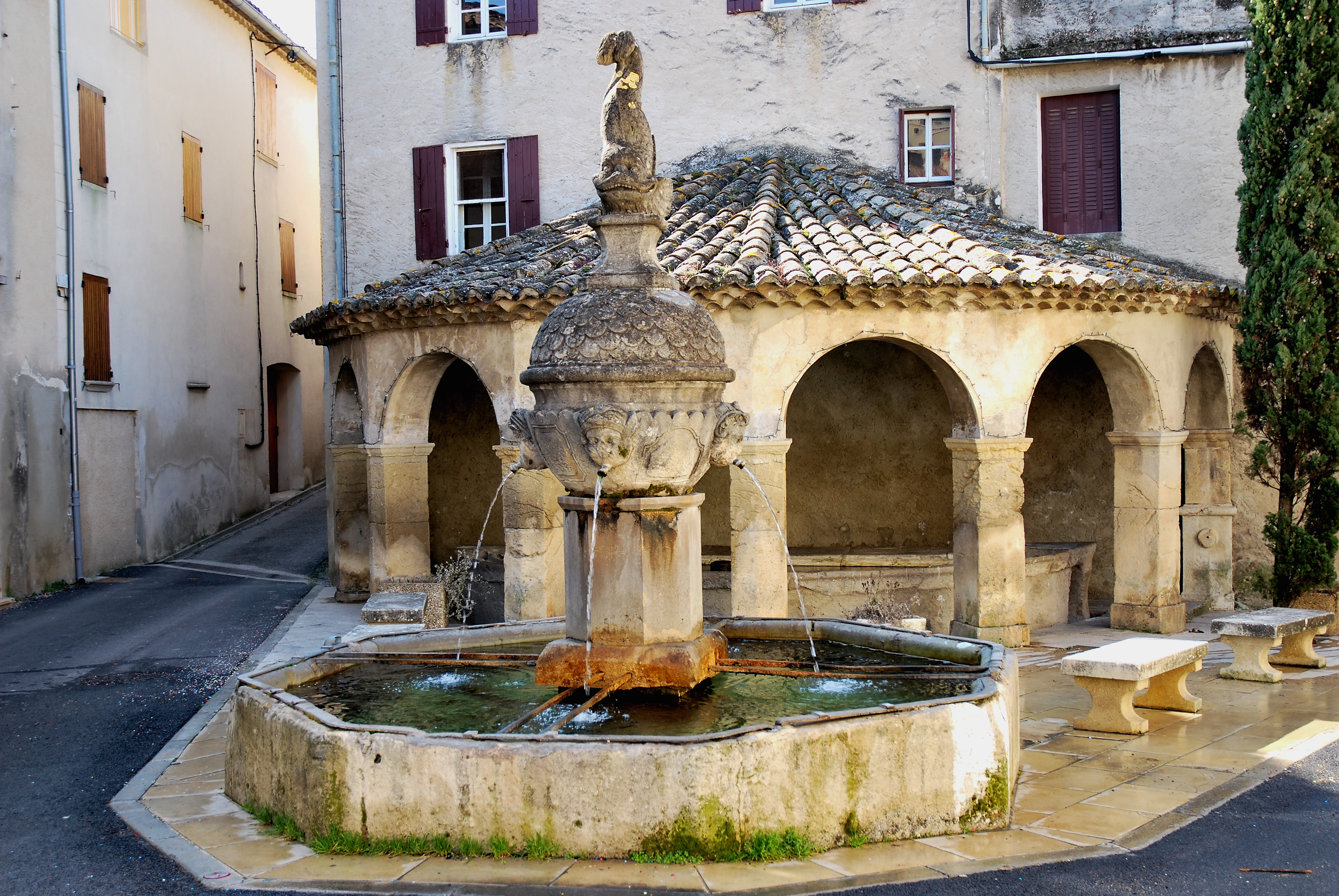 fontaine de mollans sur l'ouveze